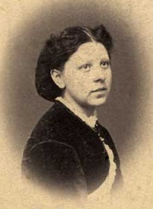 Sof'ja Adol'fovna Tichockaja Dmochovskaja (1848-1919)